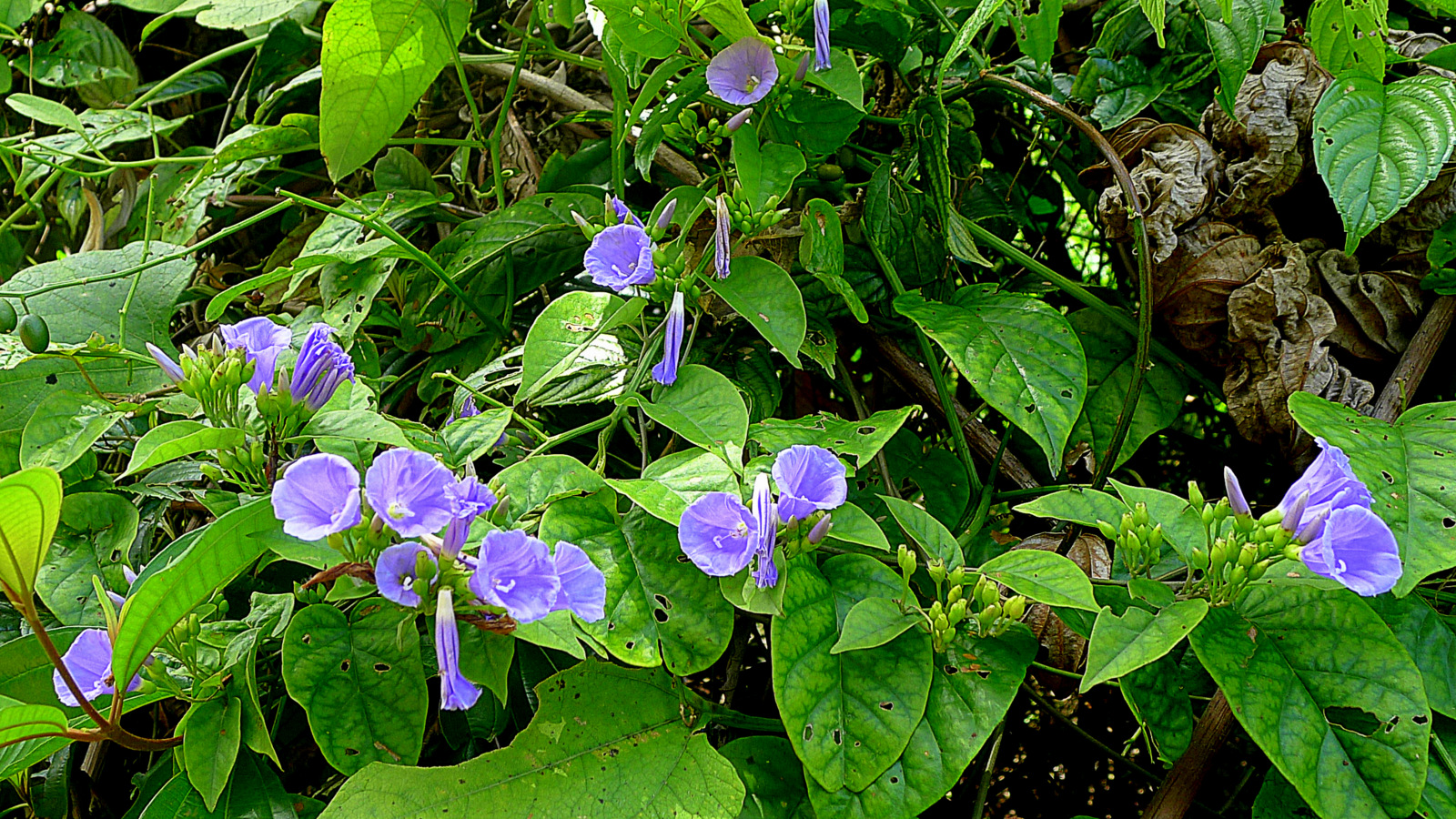 Jacquemontia glaucescens Choisy